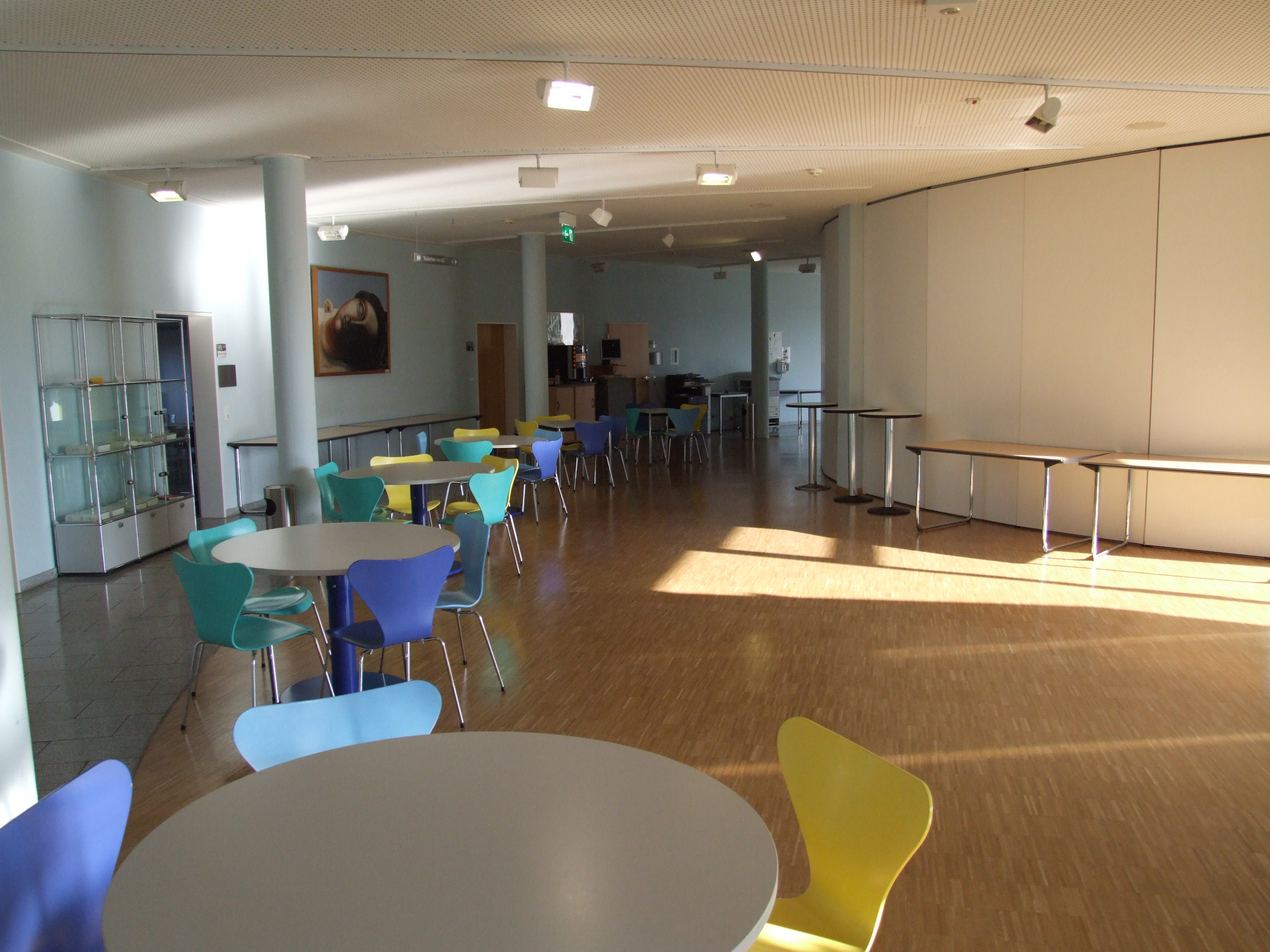 Foyer des Gästehauses der Universität Speyer